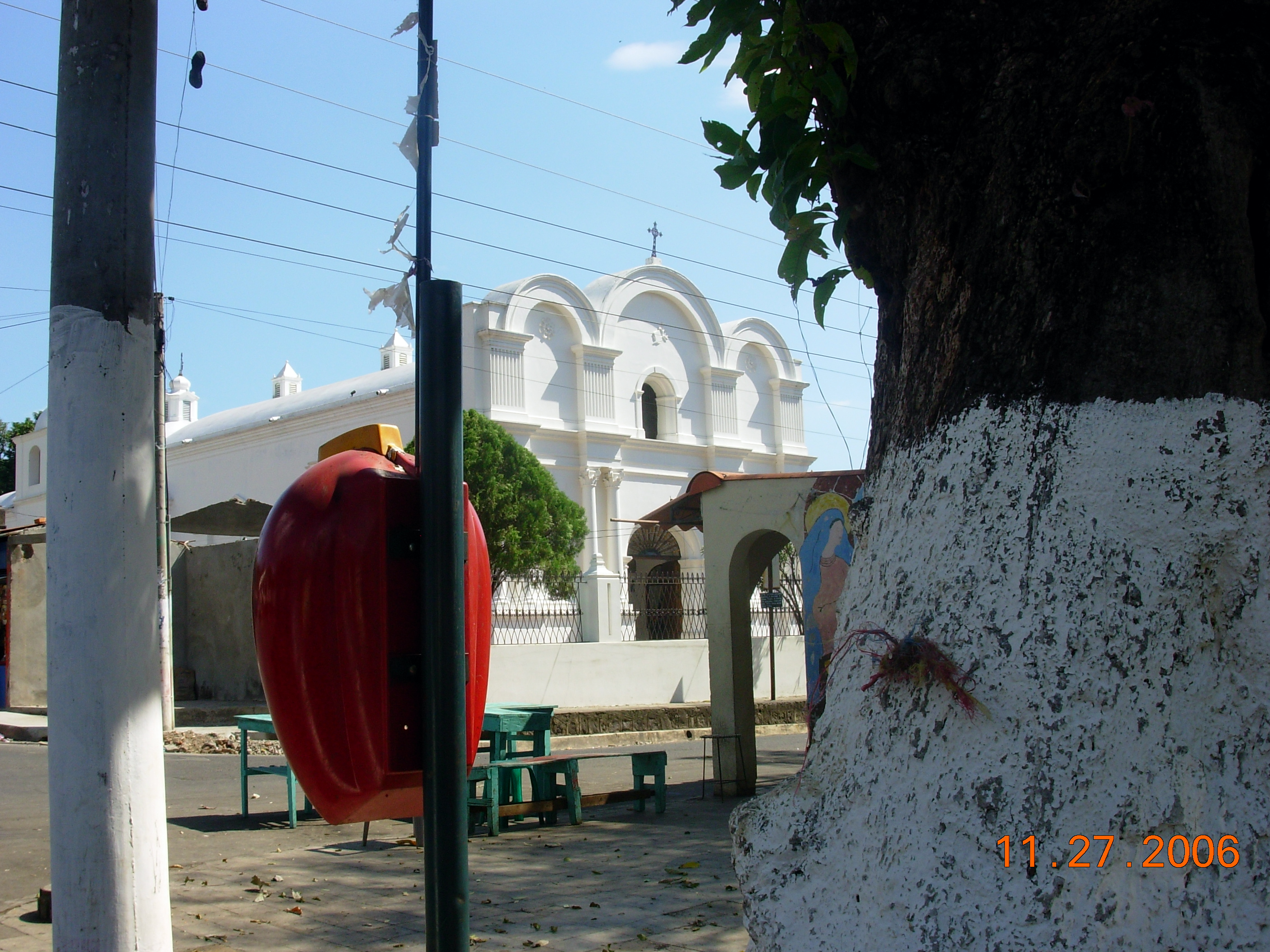 Templo catolico San Antonio del Monte